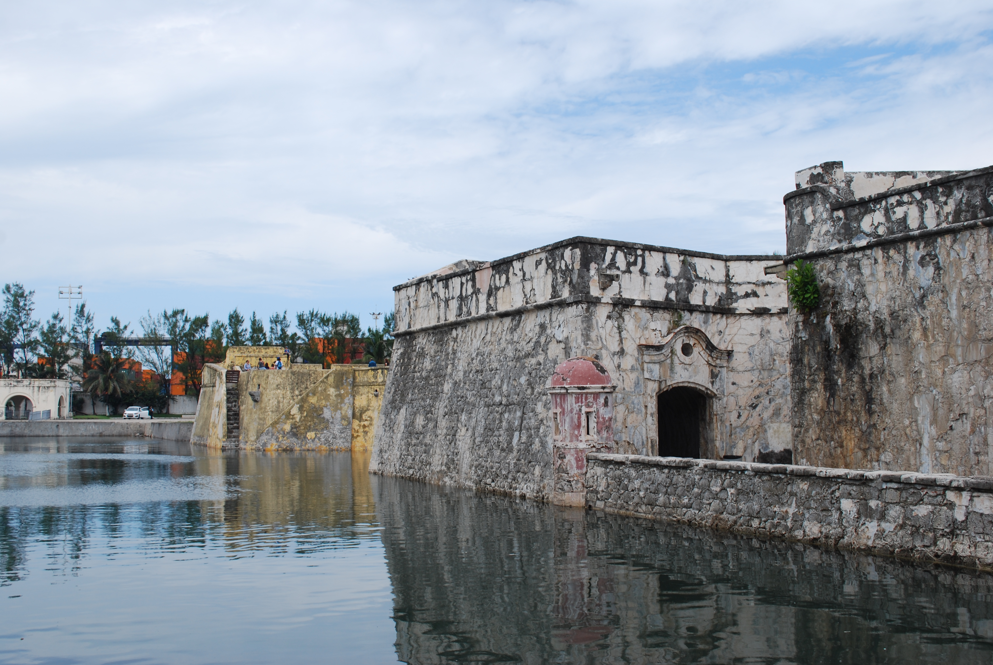 Vista de la entrada al castillo y fortaleza San Juan de Ulúa en Veracruz